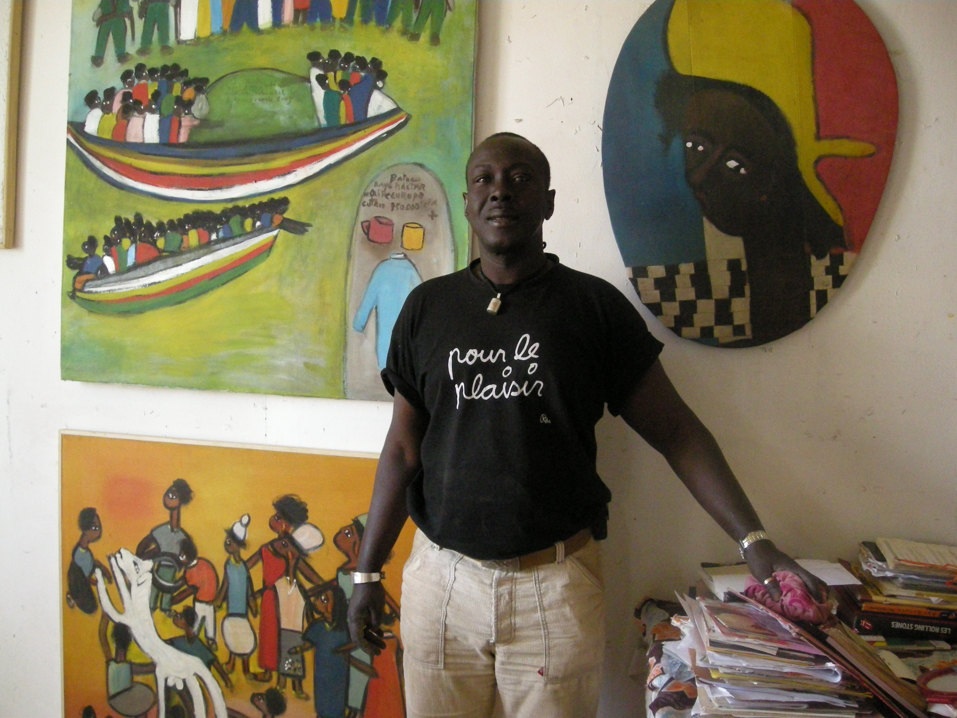 Le peintre sénégalais Ibrahima Kébé au Village des Arts de Dakar [1]